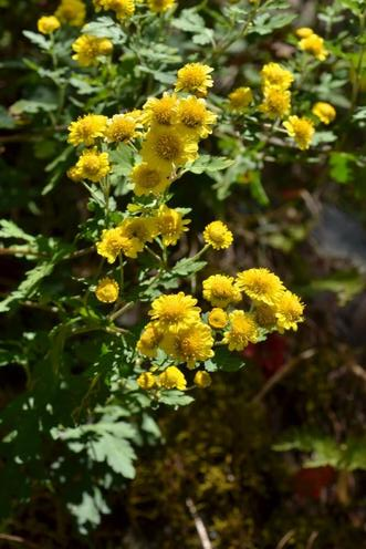 阿里山油菊